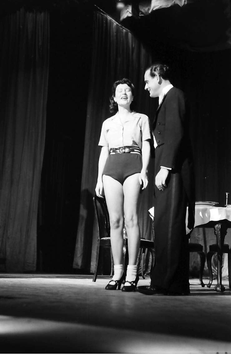 Kabarett der Komiker; Marianne Stanior und Curt Ackermann